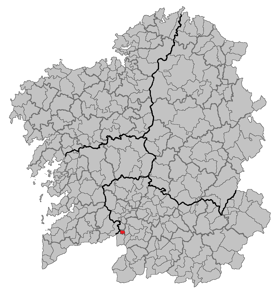 Mapa coa localización do concello de Pontedeva.